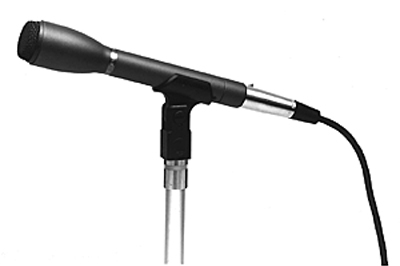 Eigen foto Dit is een foto van een microfoon die ik zelf gemaakt heb